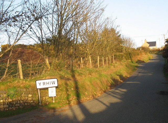 Gallt y Rhiw hill